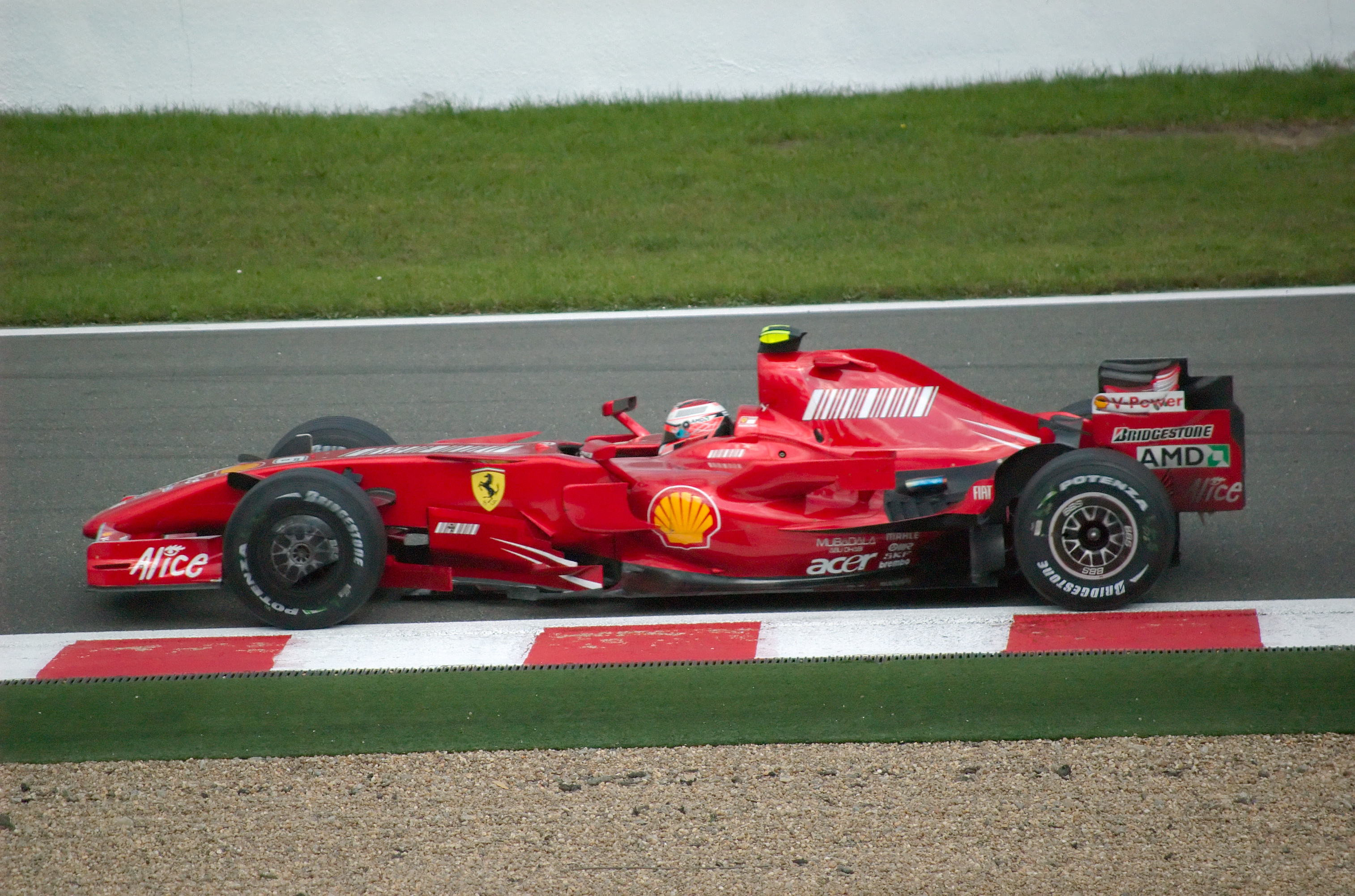 Kimi Räikkönen driving for Ferrari at the 2007 Belgian Grand Prix.